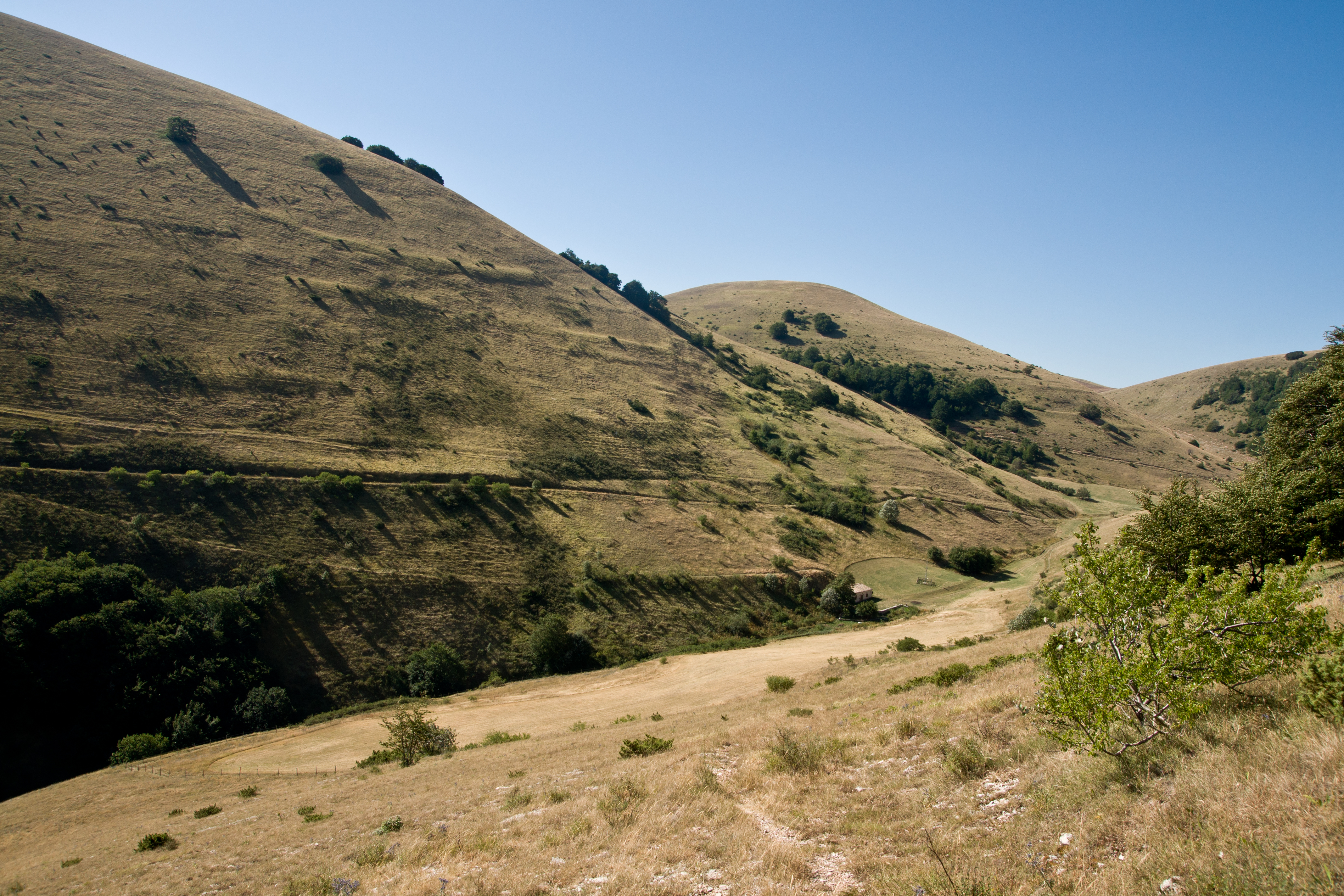 Riserva naturale Montagna di Torricchio: visuale allargata con evidente il sentiero che da Monte Fema porta al Casale Piscini e, sulla sinistra, l'imbocco della Val di Tazza. This is a photo of a monument which is part of cultural heritage of Italy. The authorisation for taking photos of this object was provided by the World Wide Fund for Nature Italy.